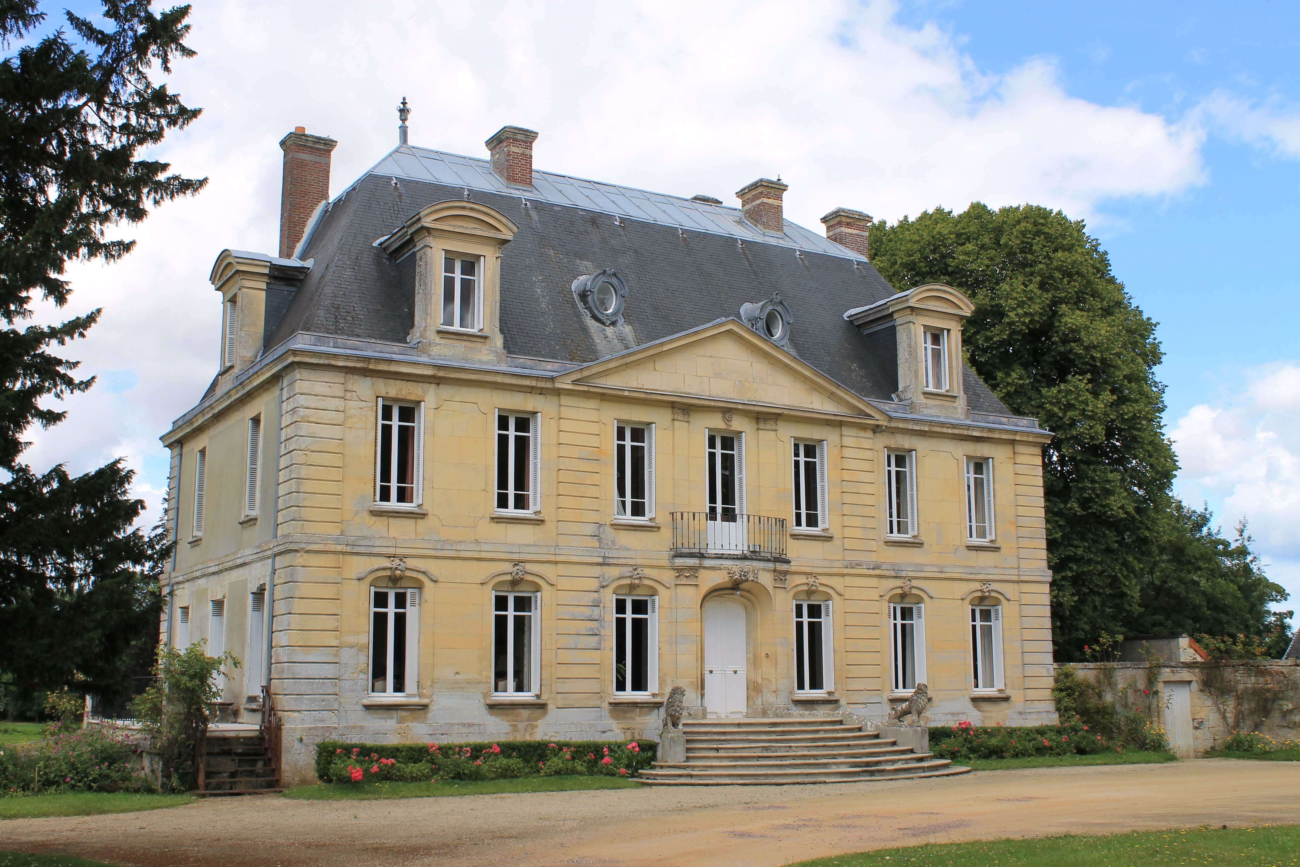 Château de Cairon (Calvados)